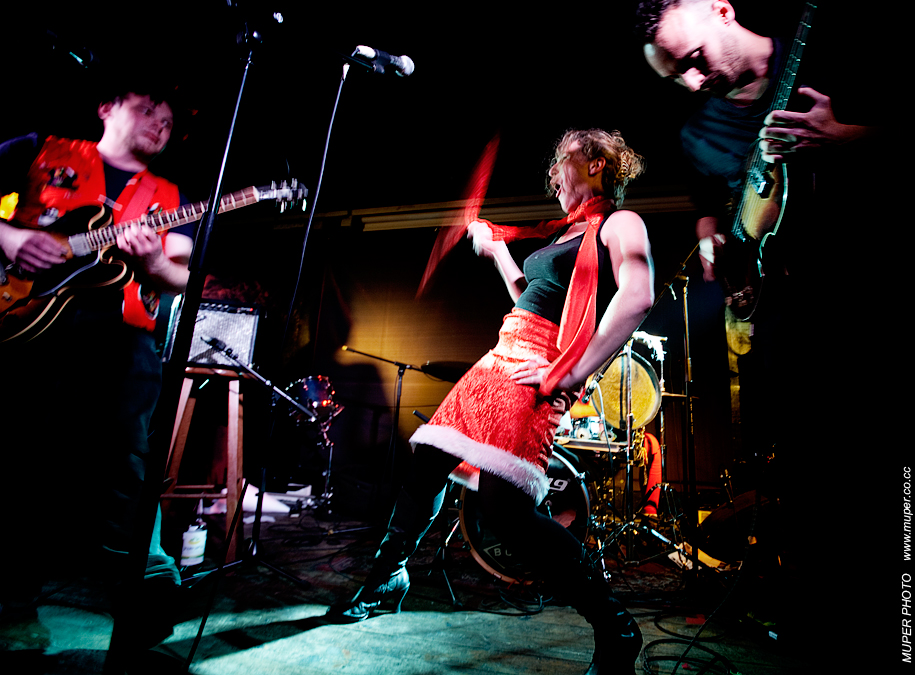 נדיה קוצ'ר בהופעה במסיבת פורים בלבונטין 7 תל אביב, בתאריך 19.03.2011